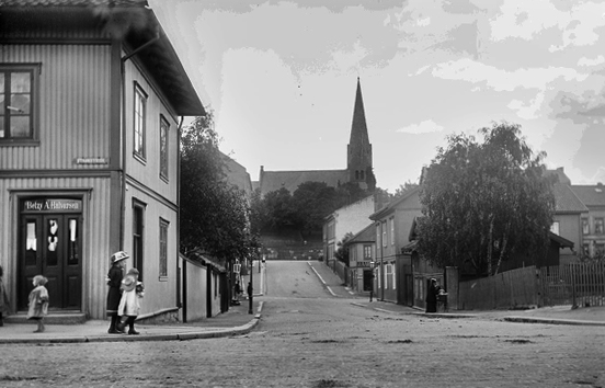 gateløp, bygårder, trehusbebyggelse, barn, kvinne, barnevogn, Vålerenga kirke, park.